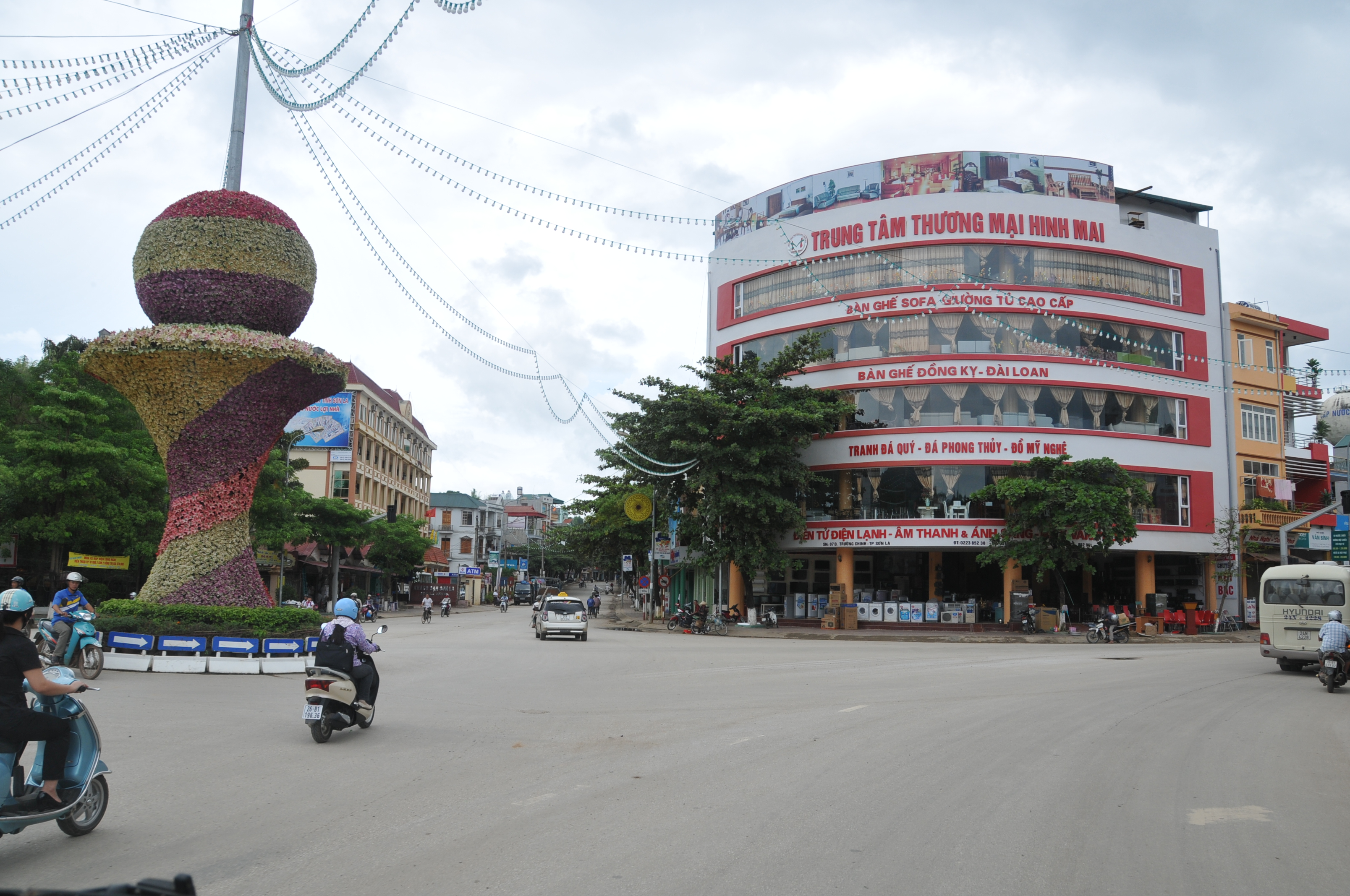 Trung tam TM Son La